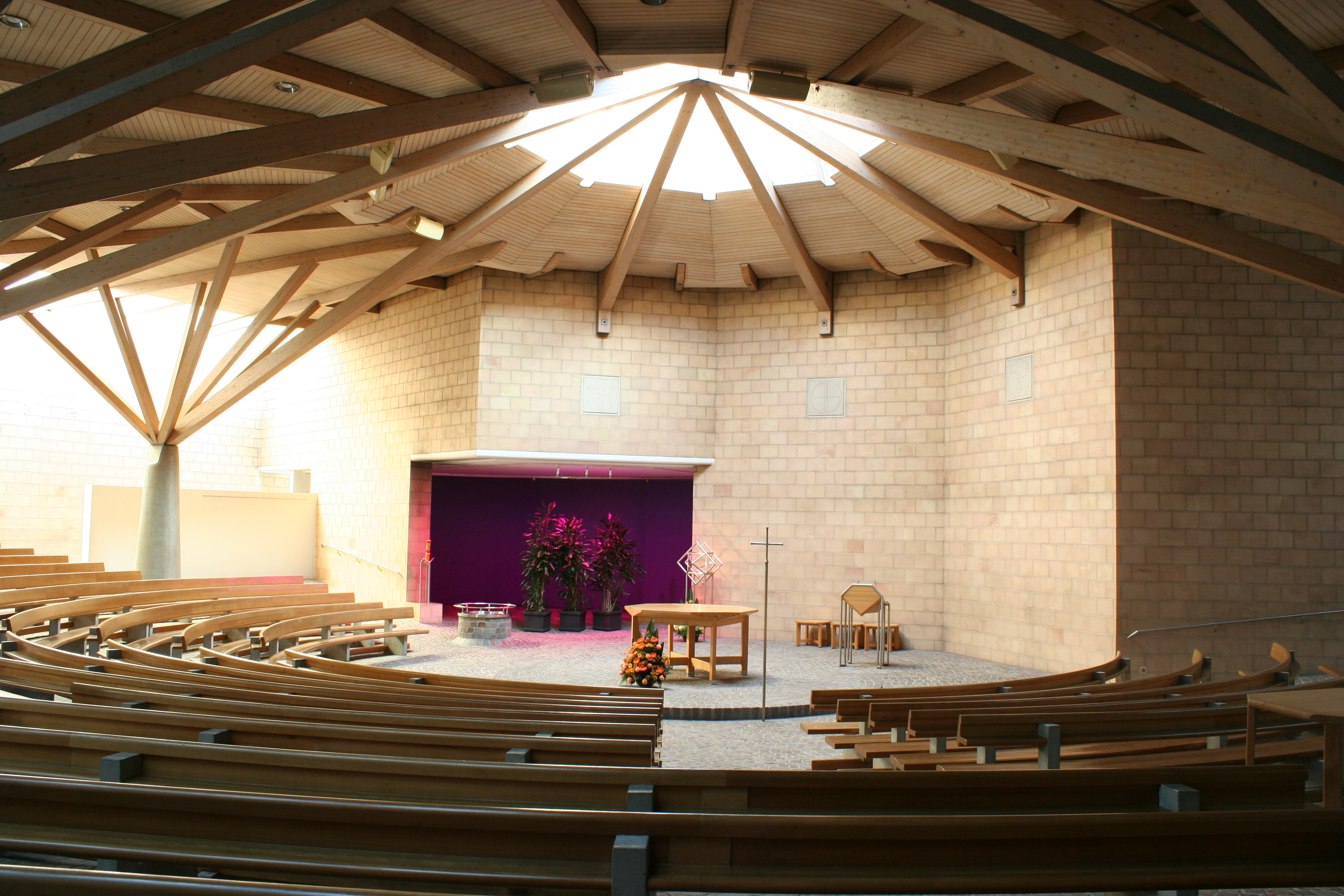 Römisch-katholische Pfarrkirche Christkönig Kloten, Altarraum